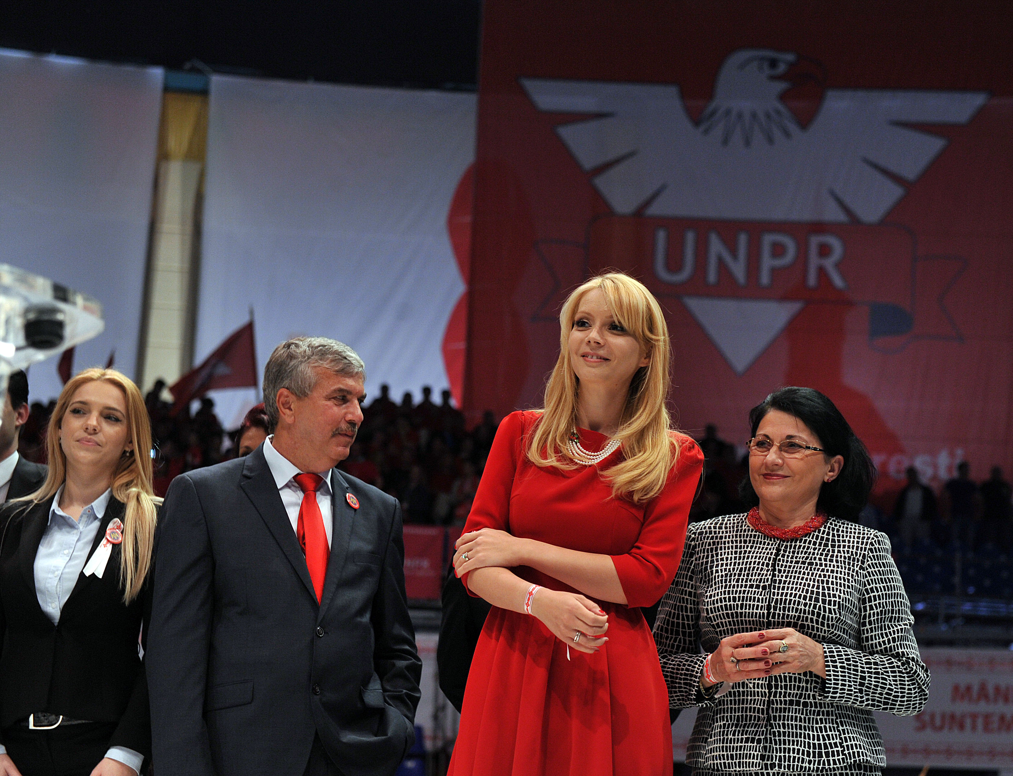 Lansarea candidatilor Aliantei PSD-UNPR-PC pentru alegerile europarlamentare (75)